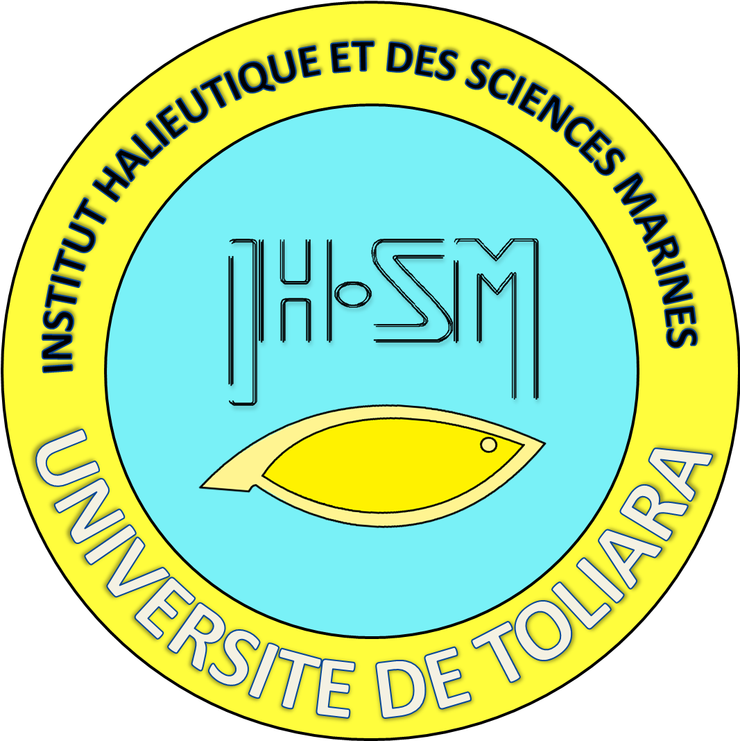 Logo officiel de l'IH.SM